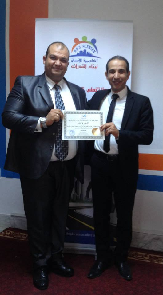 شهادة مدبر معتمد في مهارات التفوق الدراسي واستراتيجيات الامذاكرة الحديثة